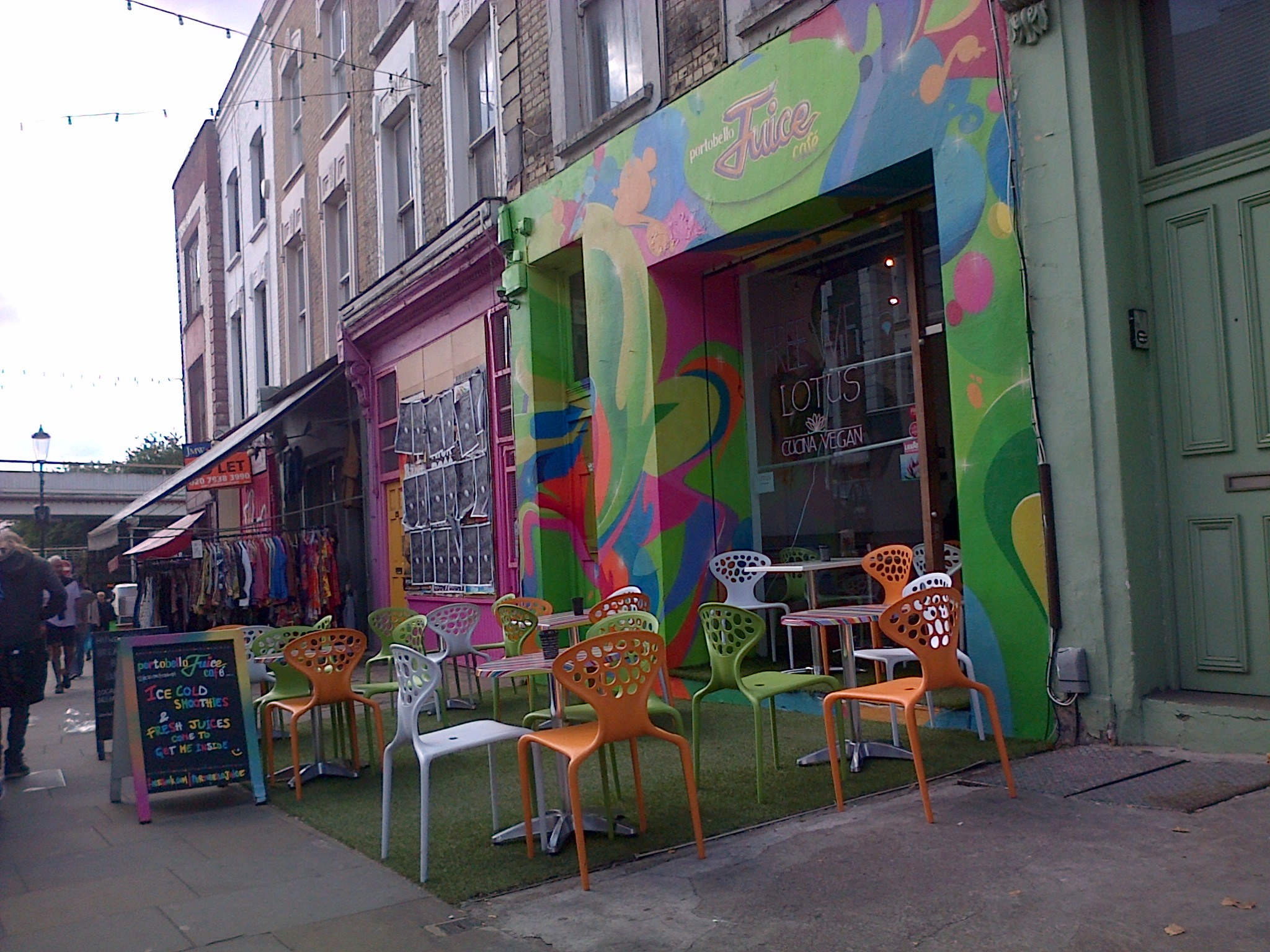 Un établissement au bout de la rue Portobello nord, quartier Notting Hill, Londres.